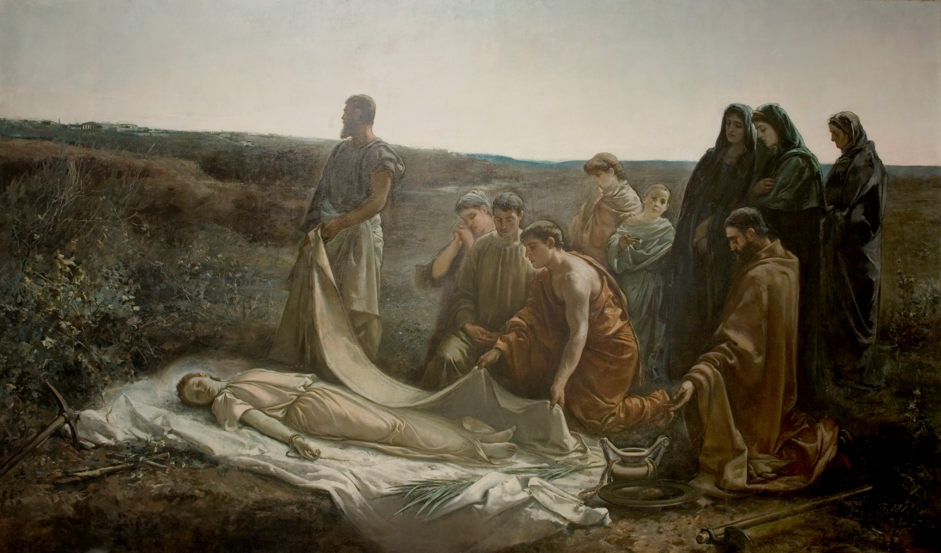 La obra representa el entierro de la virgen y mártir Santa Leocadia de Toledo, que según la tradición murió en Toledo por profesar el cristianismo durante la persecución de Diocleciano.